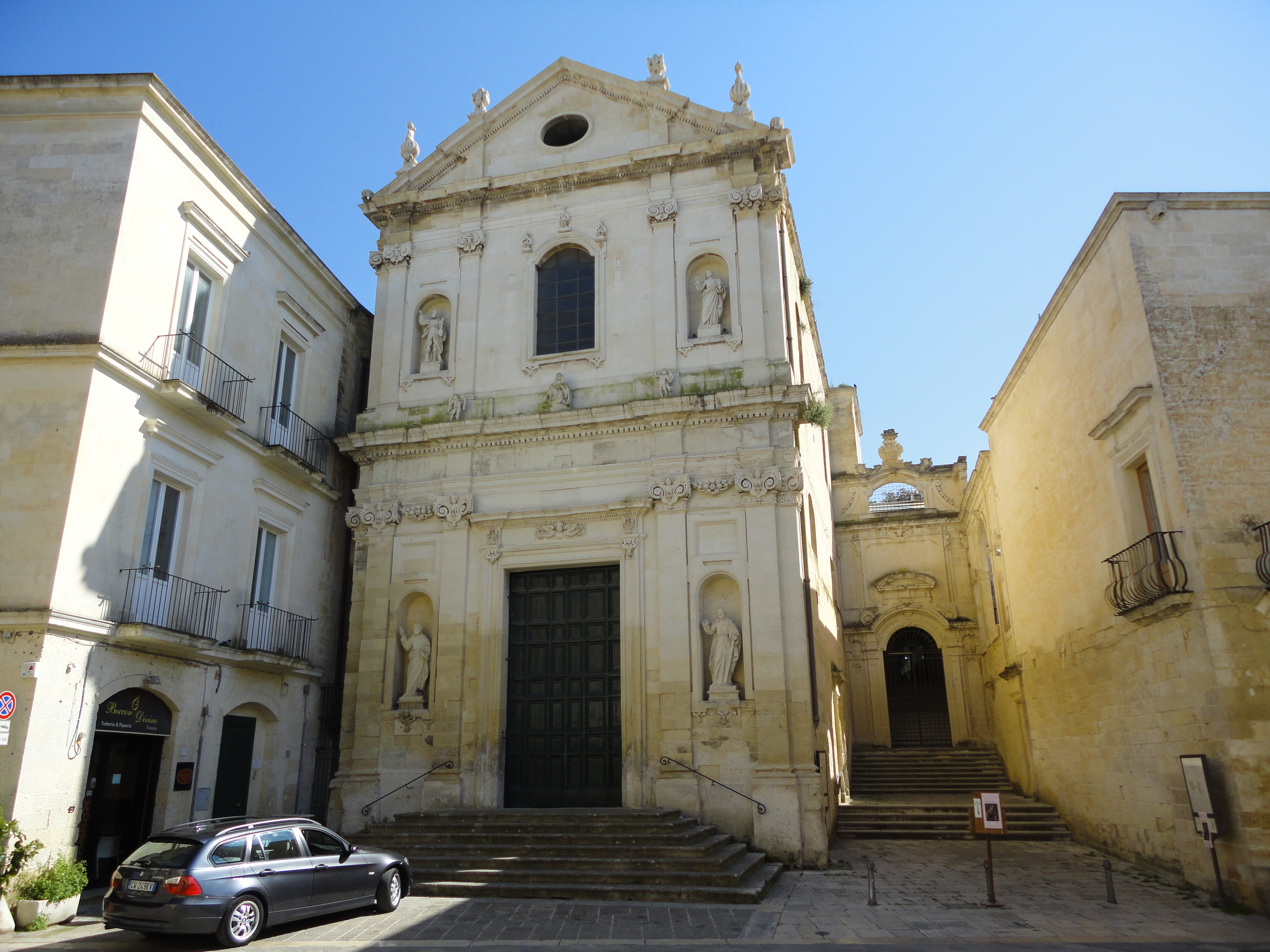 Lecce Chiesa di Sant'Anna